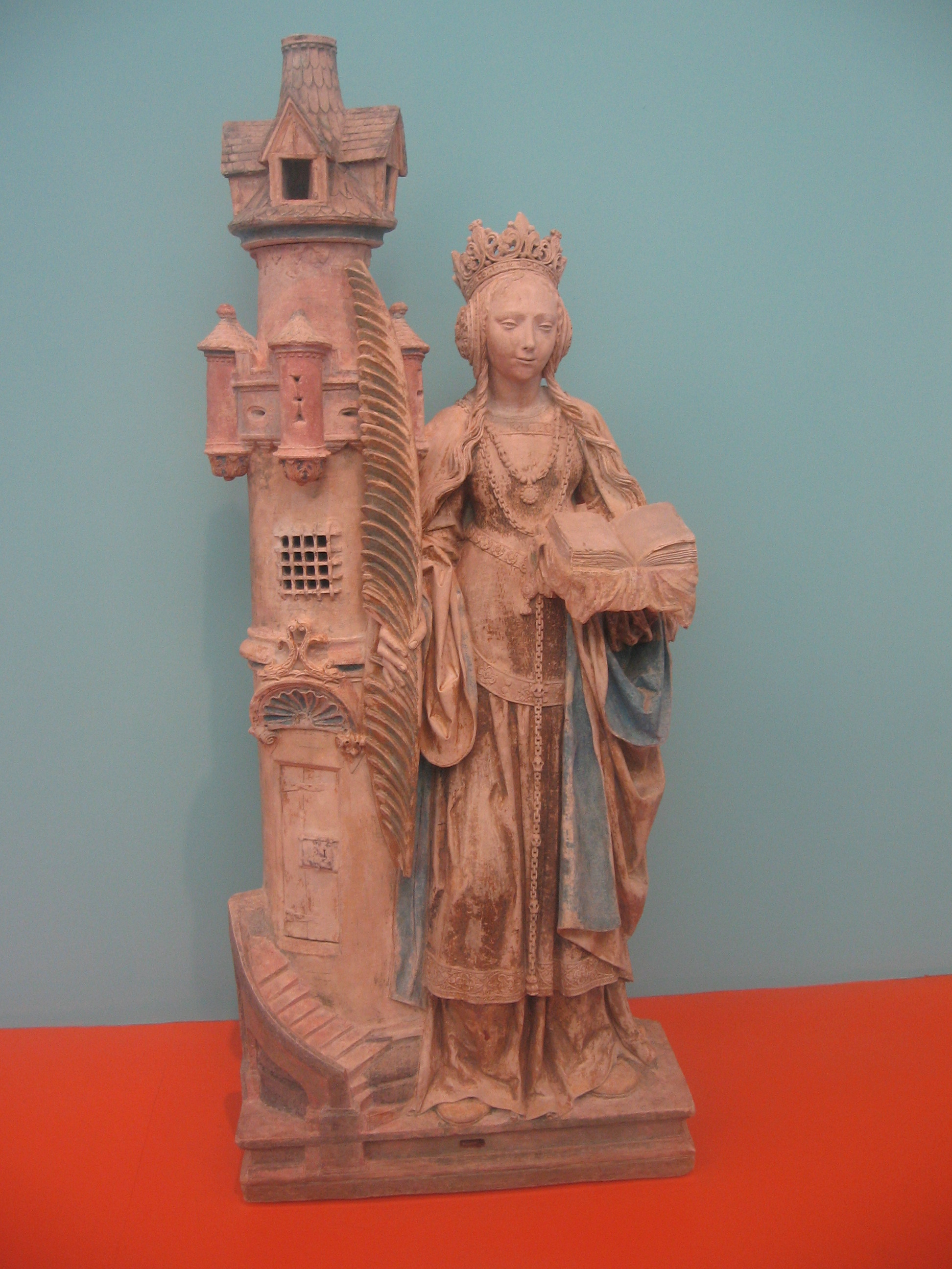 Exposition "Le Beau XVIe siècle". Sainte Barbe Vers 1520-1530. Statue, calcaire polychromé. Villeloup (Aube) - Classé Monument historique le 15.09.1984